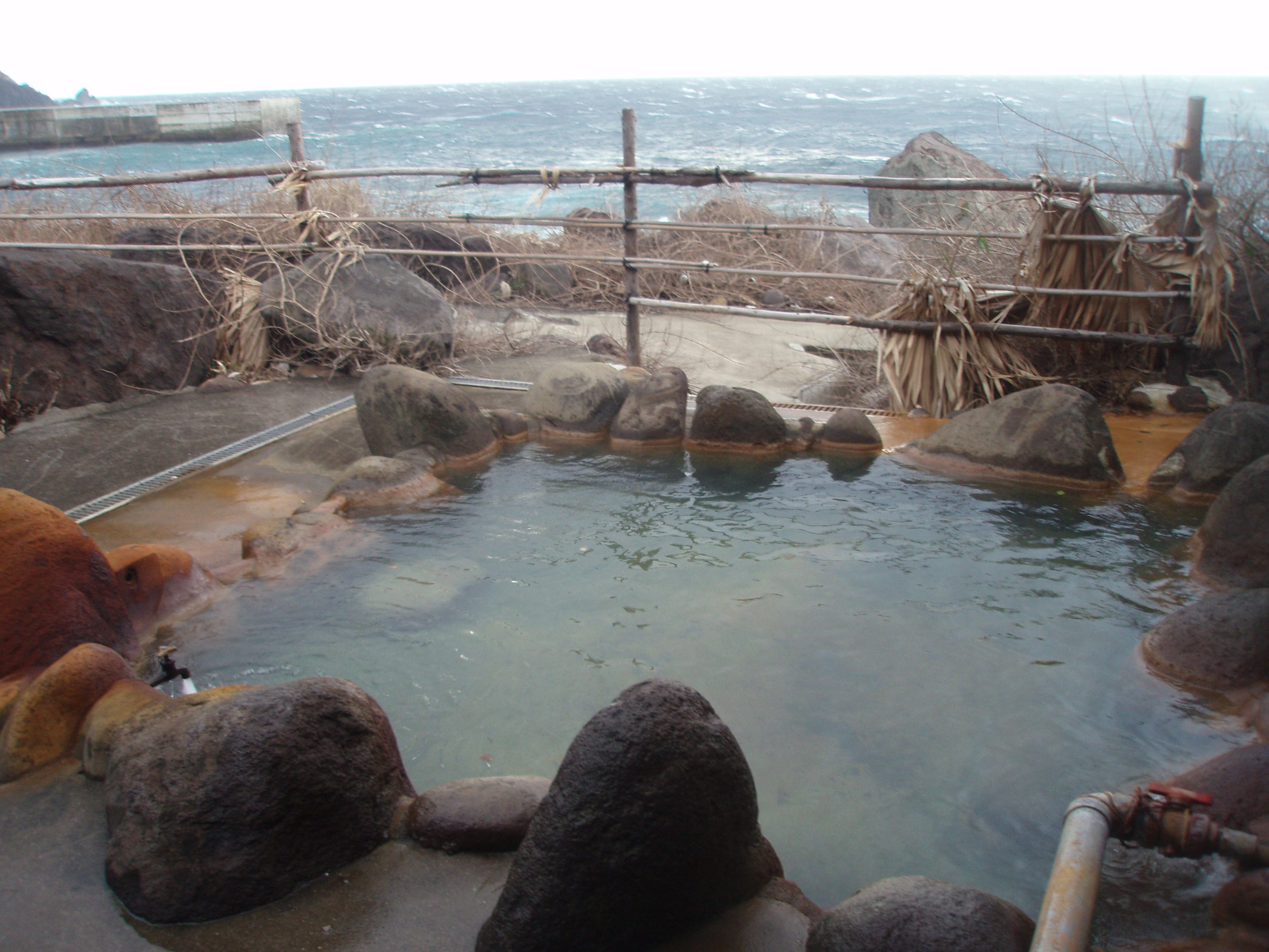 悪石島温泉の露天風呂